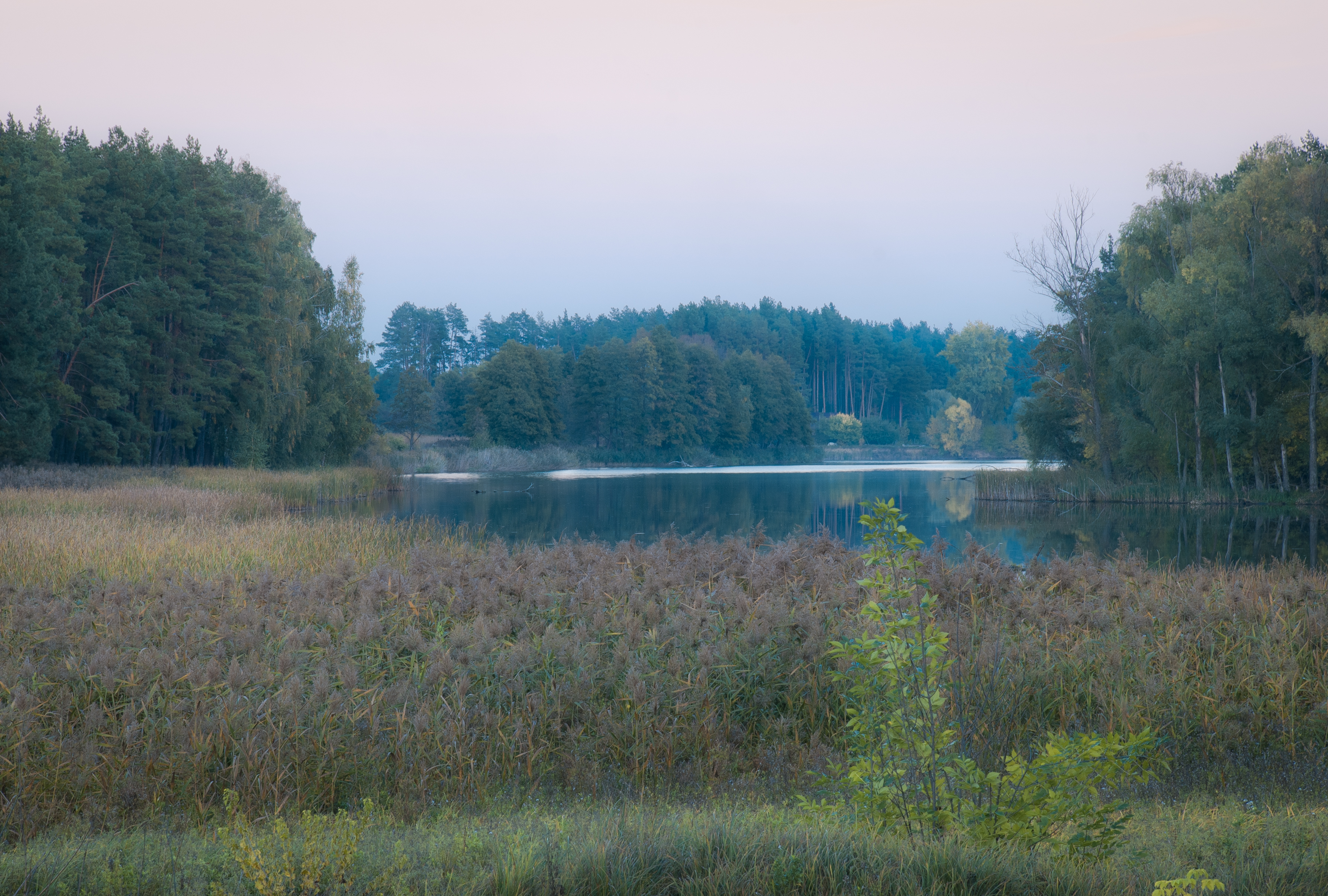 Ставок на річці Жарка в с. Великі Гуляки